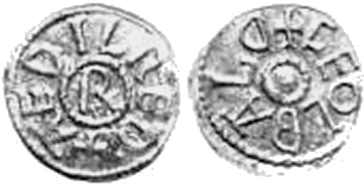 Münze des Königs Æthelred I. von Northumbria (774-778/779 und 790-796)